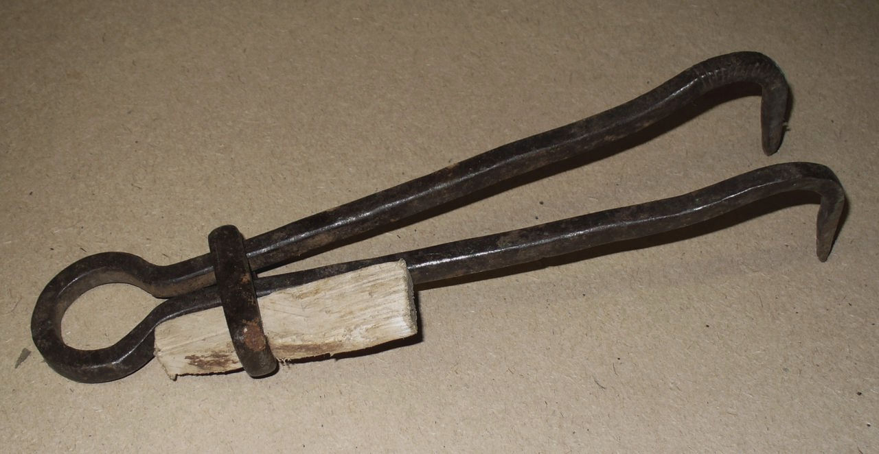 Черта. Инструмент плотника.